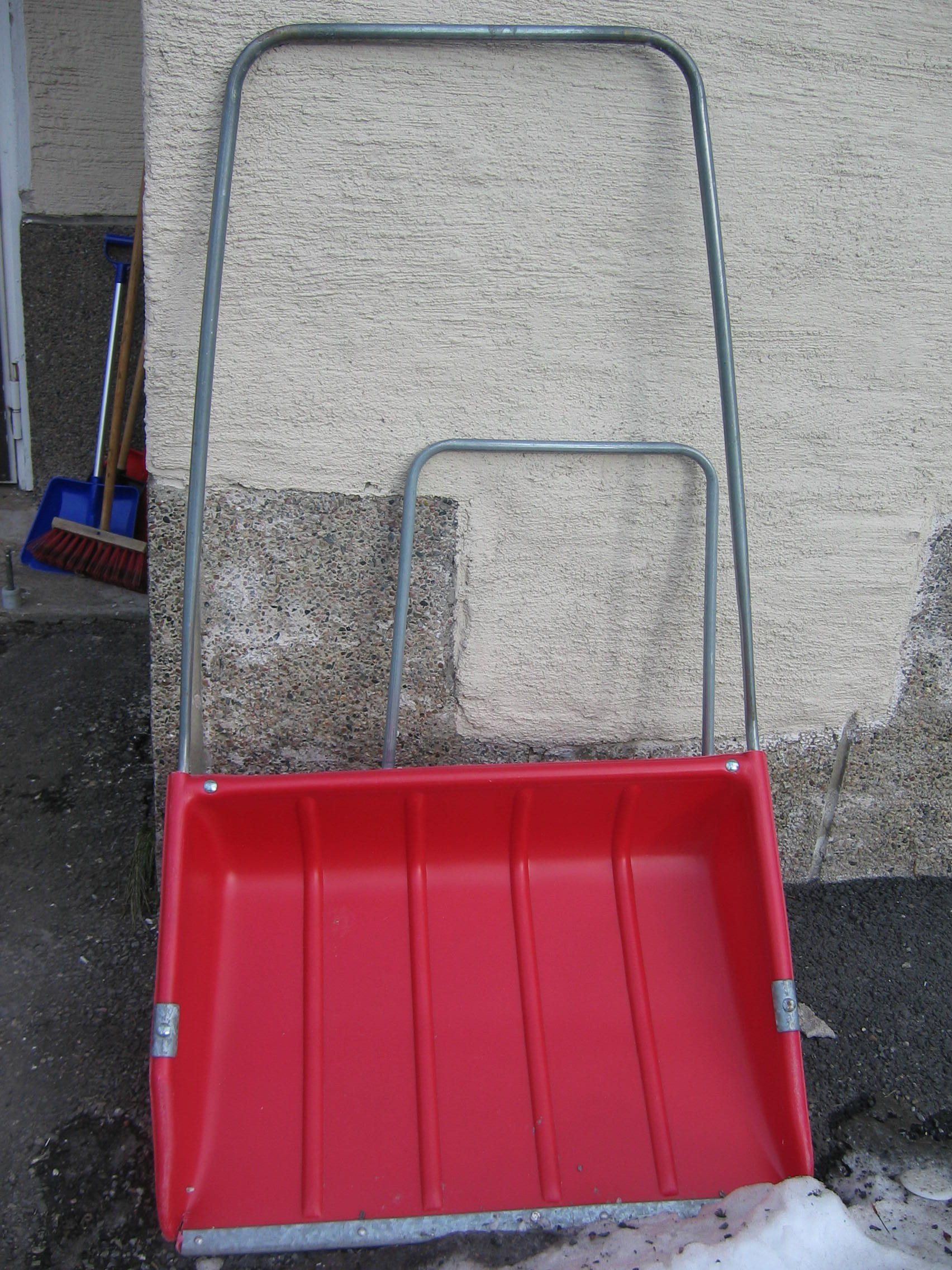 Lumikola, jonka takaa pilkistää lasten lumikolan aisa.